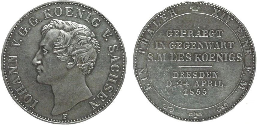 Johann König von Sachsen 1855 Münzbesuchstaler Stempelglanz vom Erstabschlag Auflage 5.250 Stück Kurantmünze im 14-Taler-Münzfuß, Silber 12 Lot = Ag 750 Feinsilbergewicht: 16,704 g Rauhgewicht: 22,272 g Durchmesser: 34 mm